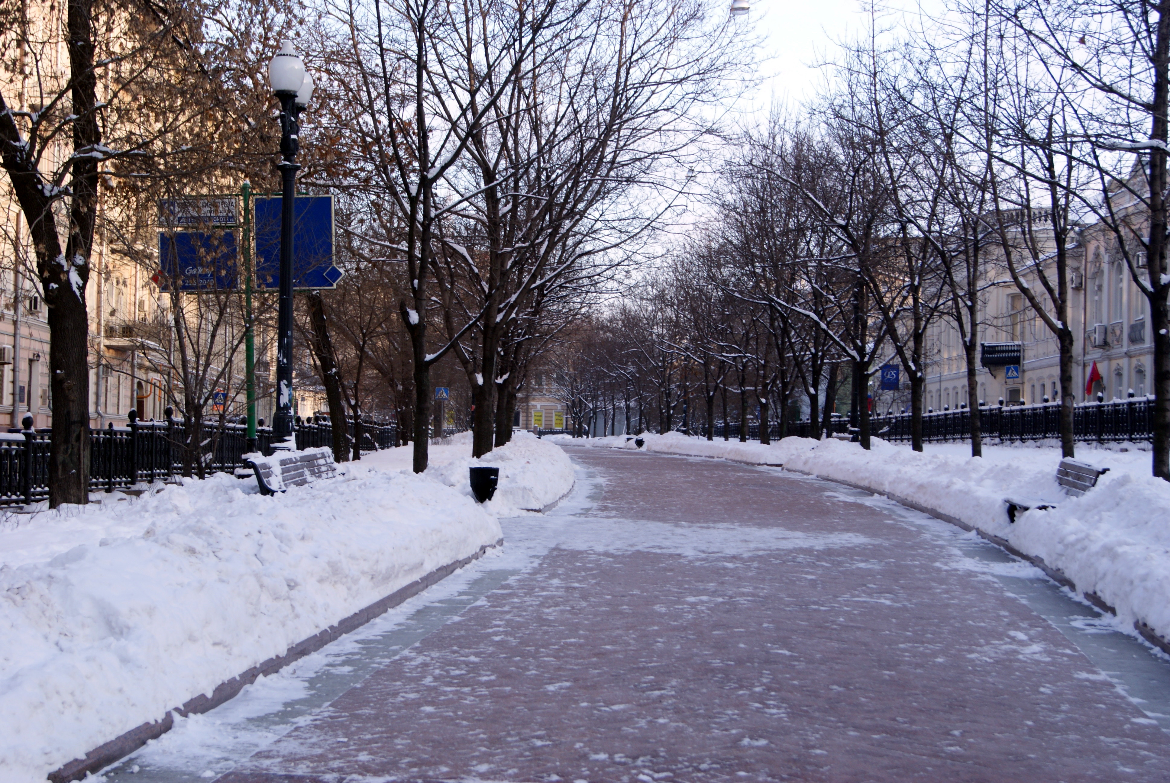 Rozhdestvenskiy boulevard